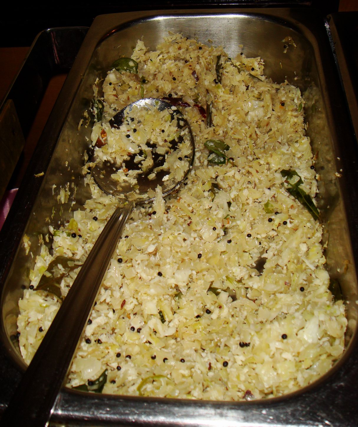 കാബേജ്-തോരൻ